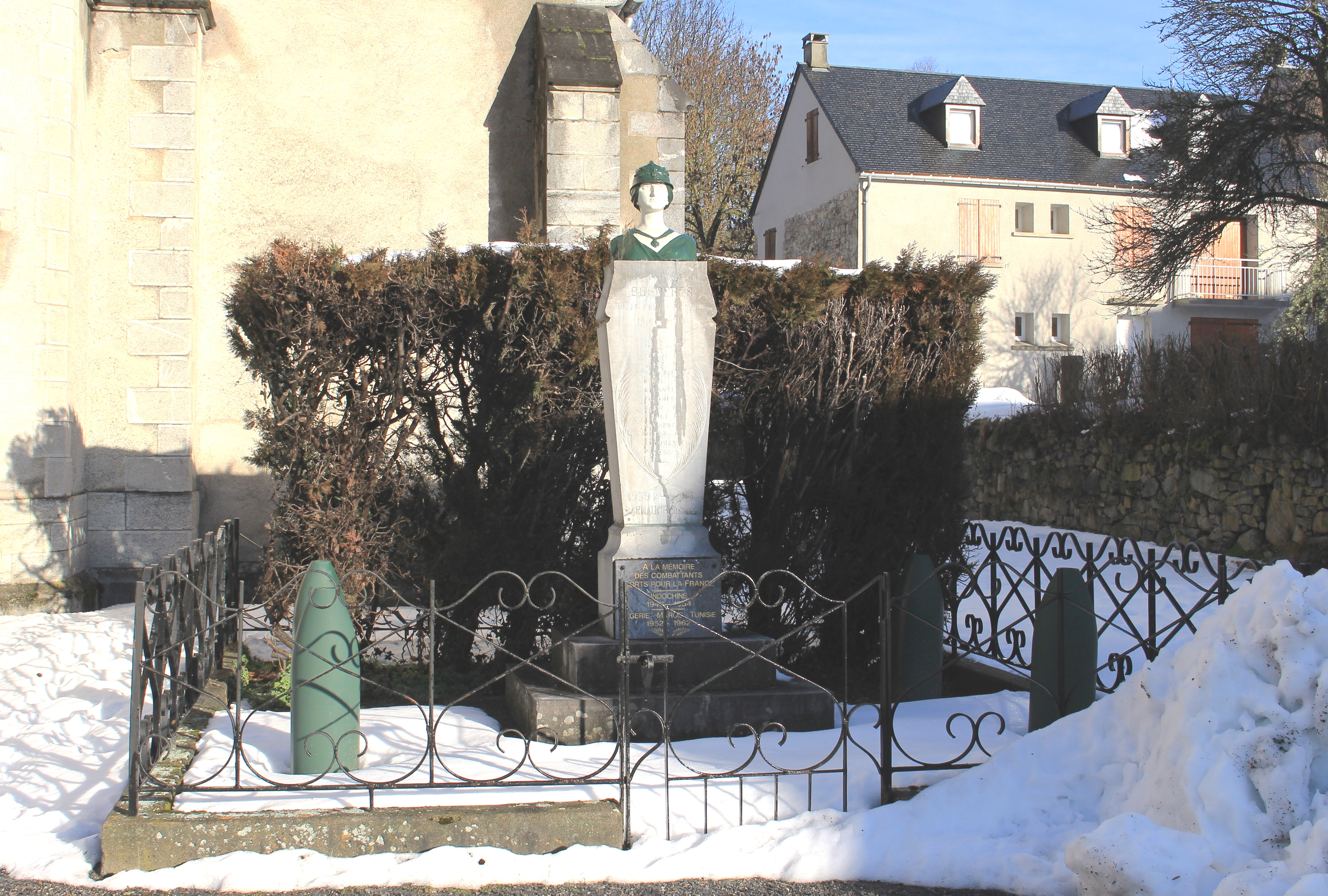 Monument aux morts de Bordères-Louron (Hautes-Pyrénées)